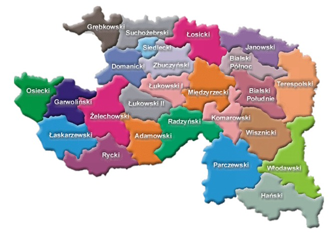 schemat dekanatów diecezji siedleckiej